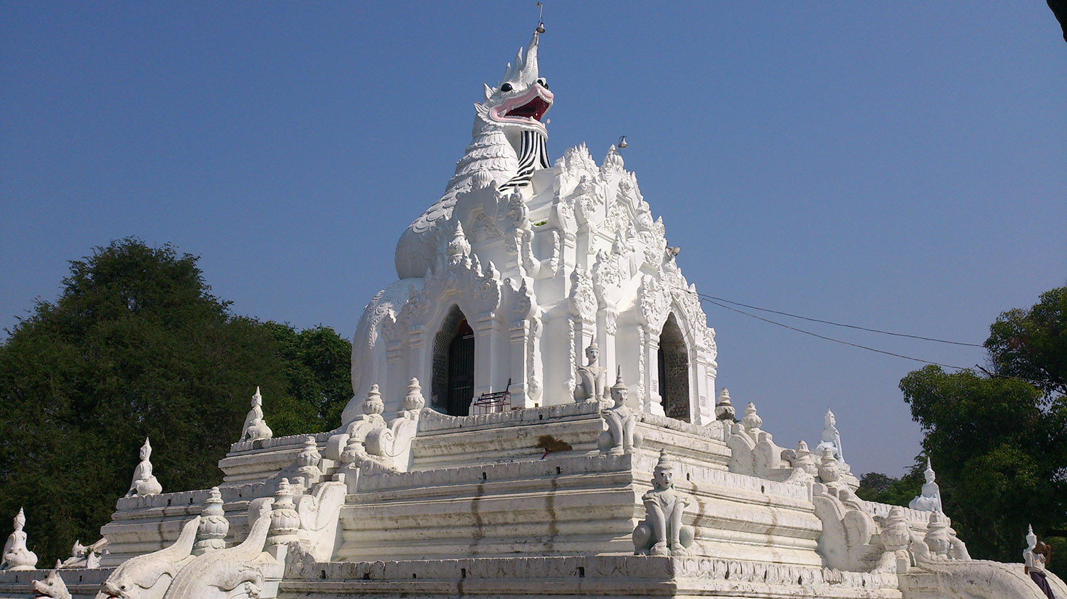 မြန်မာဘာသာ: နန်းမတော်မမြလေး ထပ်ဆင့်တည်ထားသည့် အမရပူရမှ နဂါးရုံဘုရား